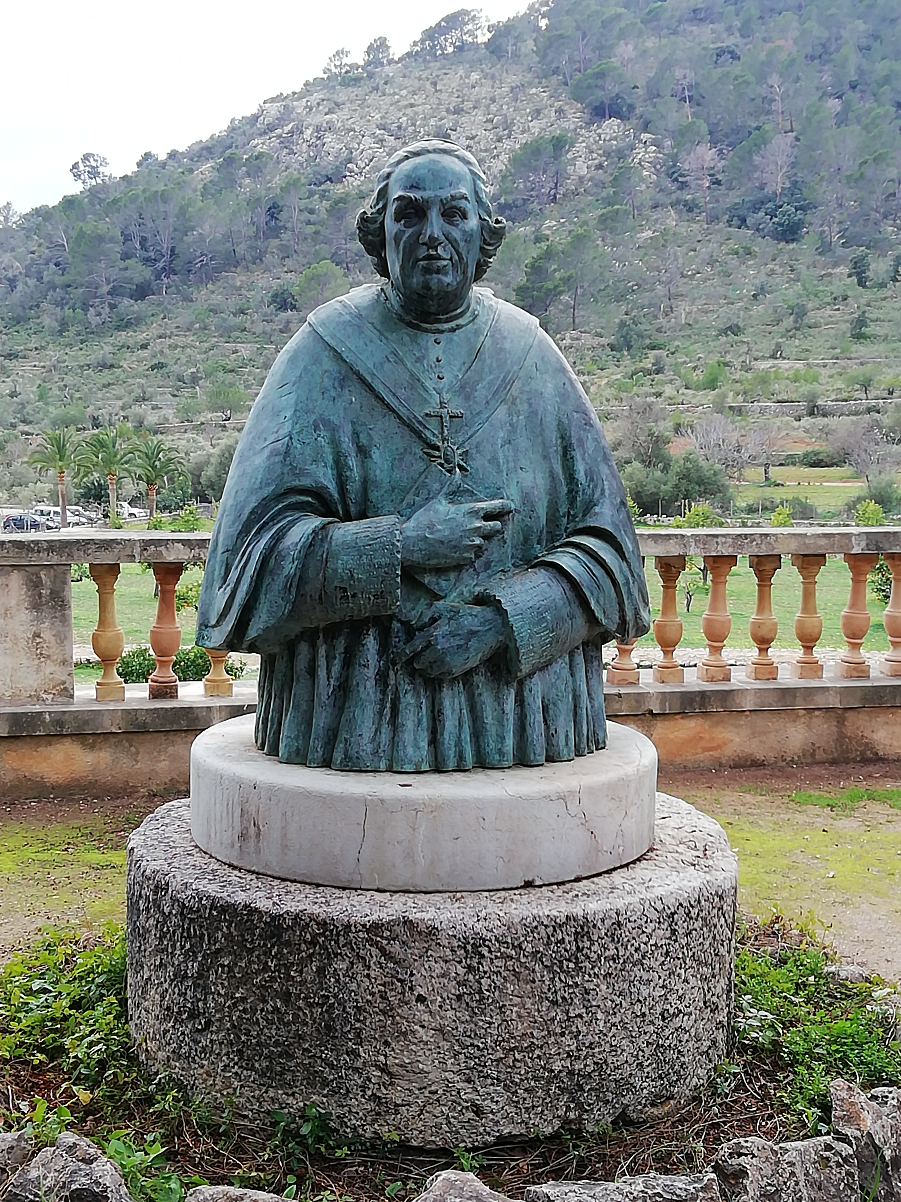 Estatua del cardenal Antonio Despuig I Dameto, en la finca mallorquina Raixa, en Buñola.